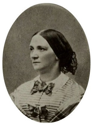 Елизавета Васильевна Васильева (1821-1877), урожденная Вильсон